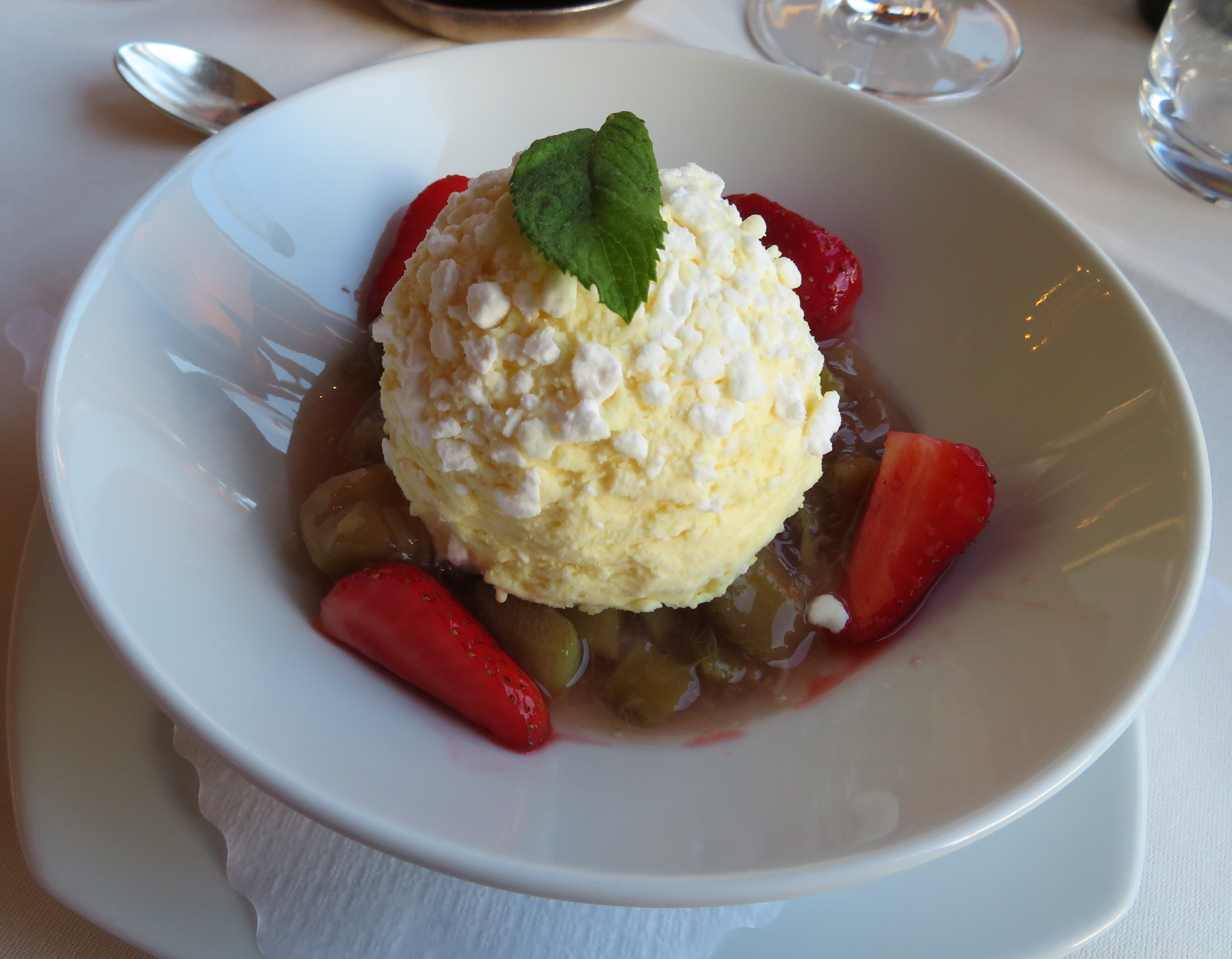 Halbgefrorenes mit Rhabarber-Erdbeer-Sauce